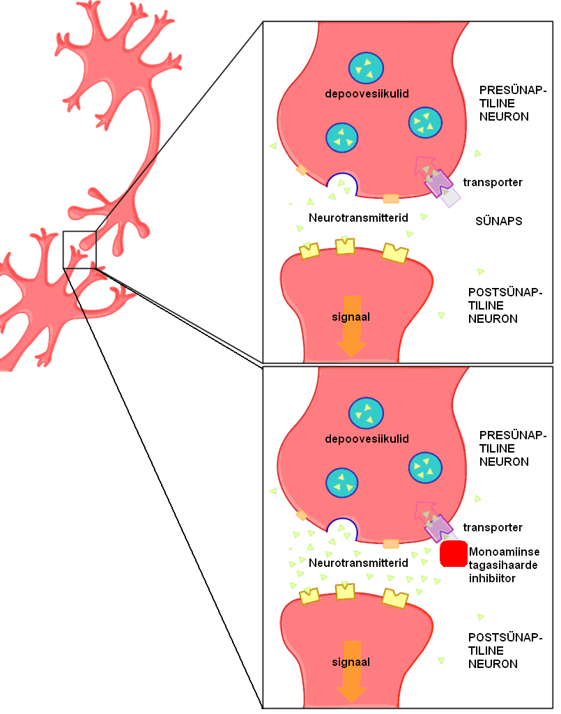 Neurotransmissiooni jooksul vabanevad monoamiinsed neurotransmitterid, nagu serotoniin, dopamiin ja noradrenaliin, presünaptilise neuroni depoovesiikulitest sünaptilisse pilusse. Läbinud sünaptilise pilu, seostuvad neurotransmitterid vastava retseptoriga postsünaptilisel neuronil ja põhjustavad seal signaali tekke. Neurotransmitterite tegevus lõppeb nende tagasihaardega spetsiifilise transportproteiini vahendusel presünaptilise neuroni depoovesiikulisse järgnevaks taasvabanemiseks. Monoamiinse tagasihaarde inhibiitor (amitriptüliin) seostub transporteriga, mille tulemusena tagasihaare blokeeritakse ja monoamiinse neurotransmitteri sisalduse tõusuga sünaptilises pilus ilmneb intensiivistunud neurotransmissioon.